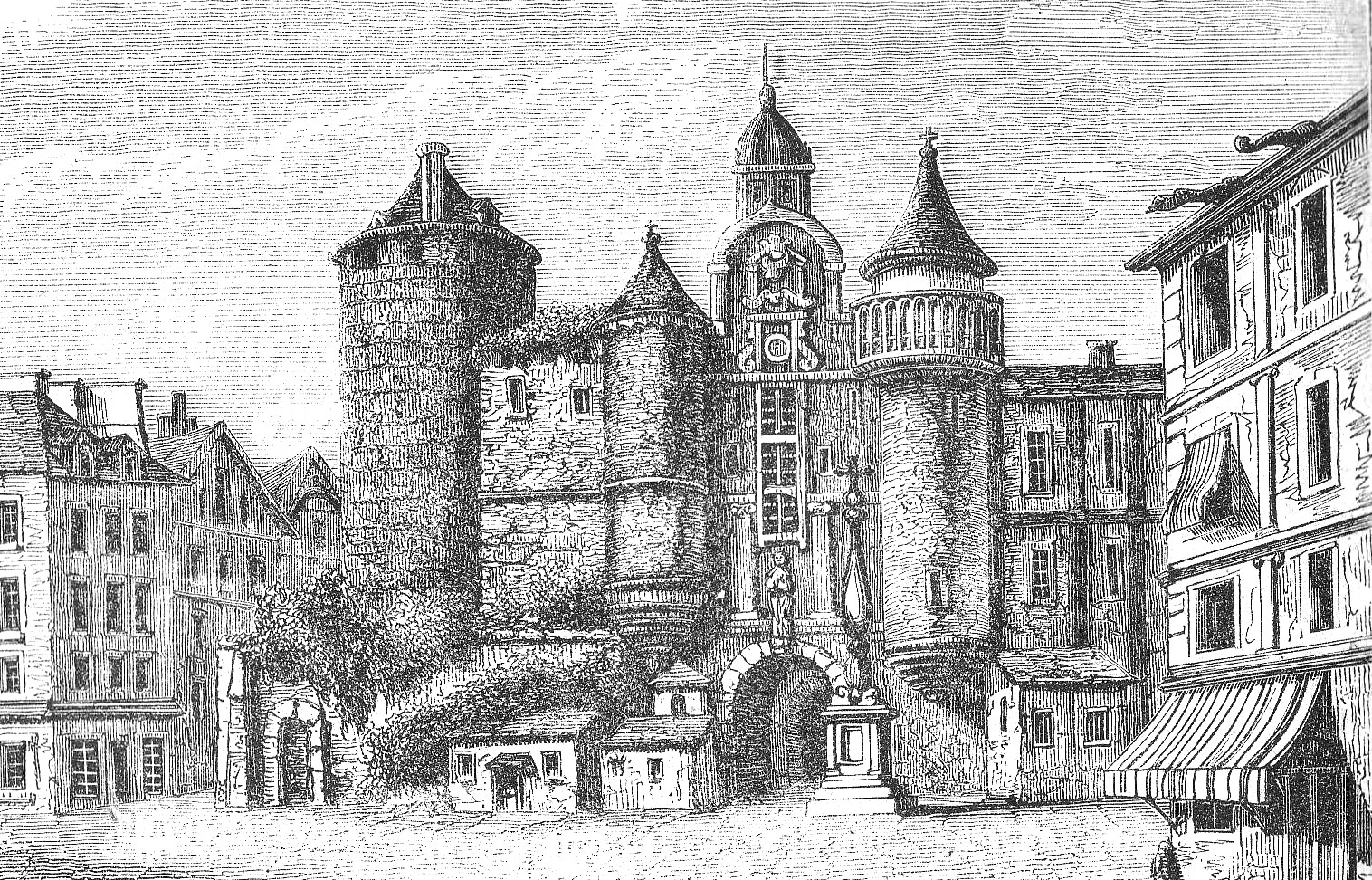 Vue de l'entrée du grand châtelet de Paris au XVIIème siècle.